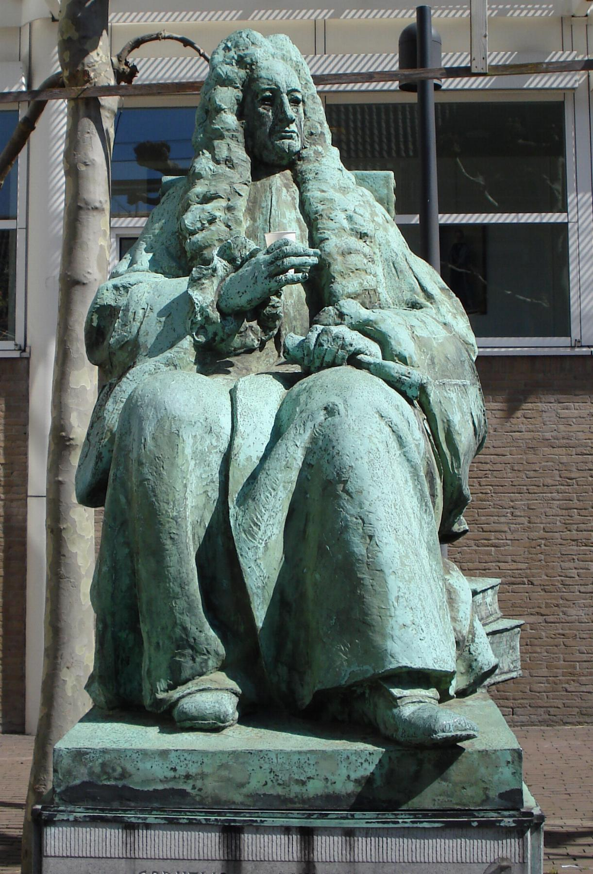 Den Haag, centrum, Kazernestraat. Kunstwerk "Cornelis van Bijnckershoek" van Albert Termote. Den Haag/The Netherlands